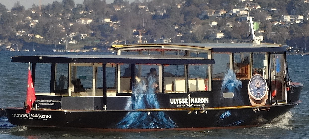 La « mouette » MG N°6, Solaris, avec son habillage Ulysse Nardin (depuis le 30 novembre 2016). Au départ de l'embarcadère De-Chateaubriand.